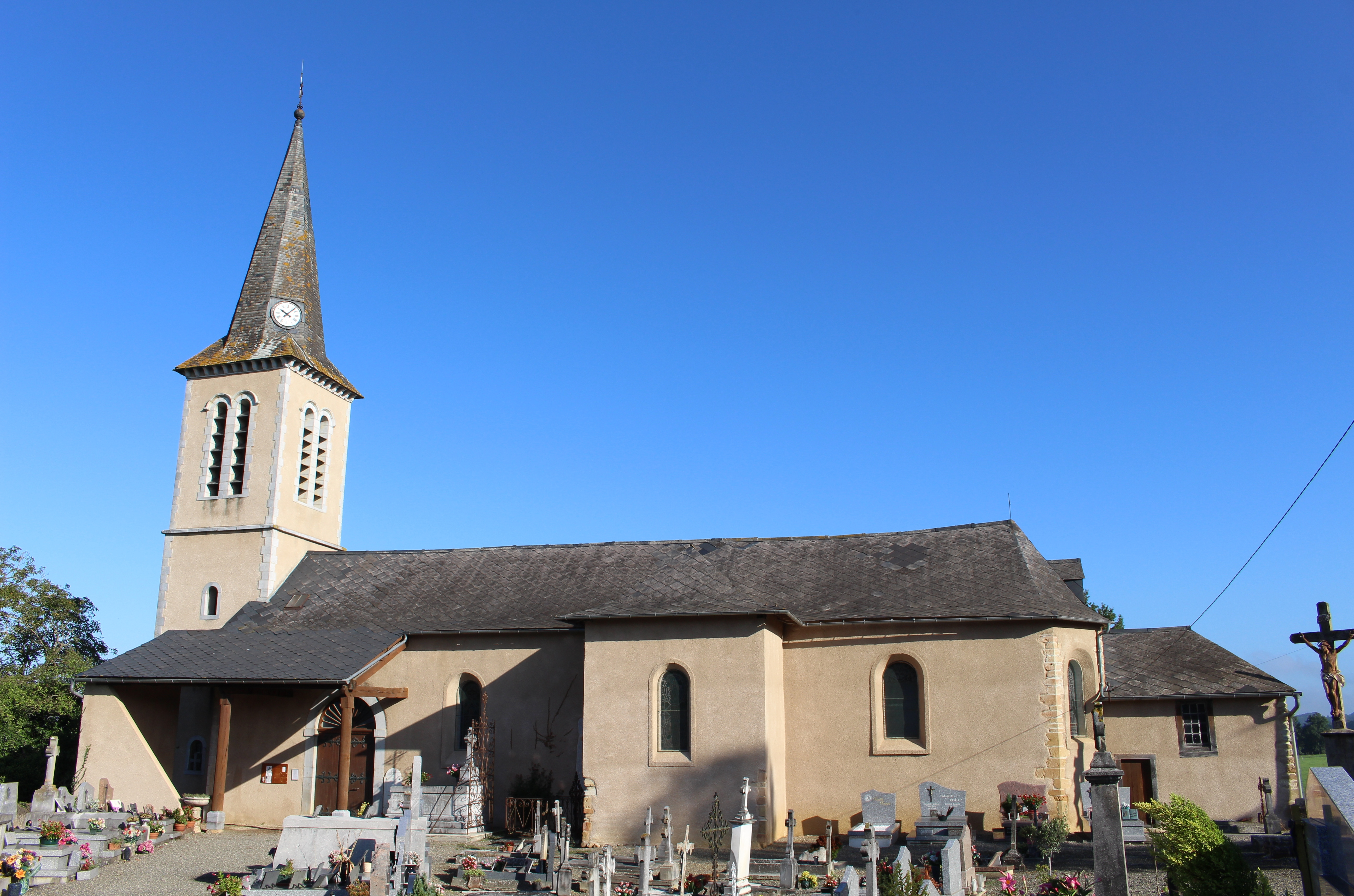 Église Saint-Saturnin de Clarac (Hautes-Pyrénées)